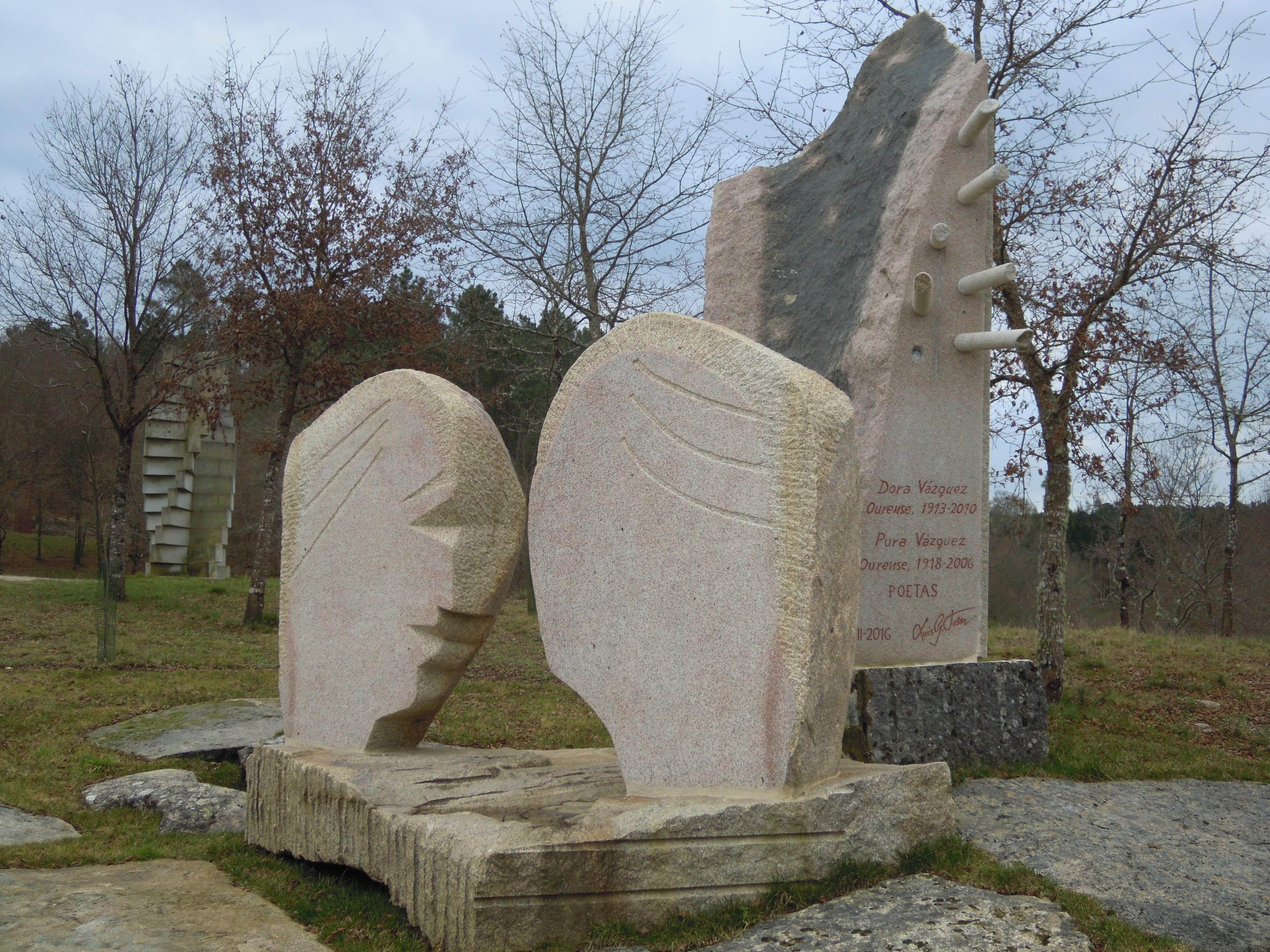 Escultura en homenaxe a Pura e Dora Vázquez na Insua dos Poetas